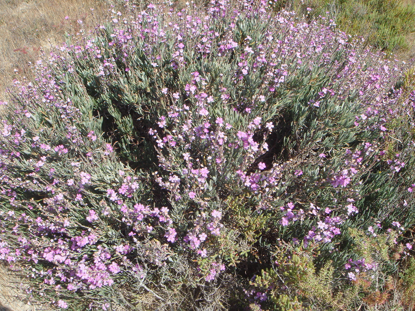 Salado (Limoniastrum monopetalum), Parque Natural Bahía de Cádiz, San Fernando, (Cádiz), España